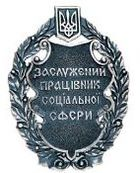 Заслужений працівник соціальної сфери